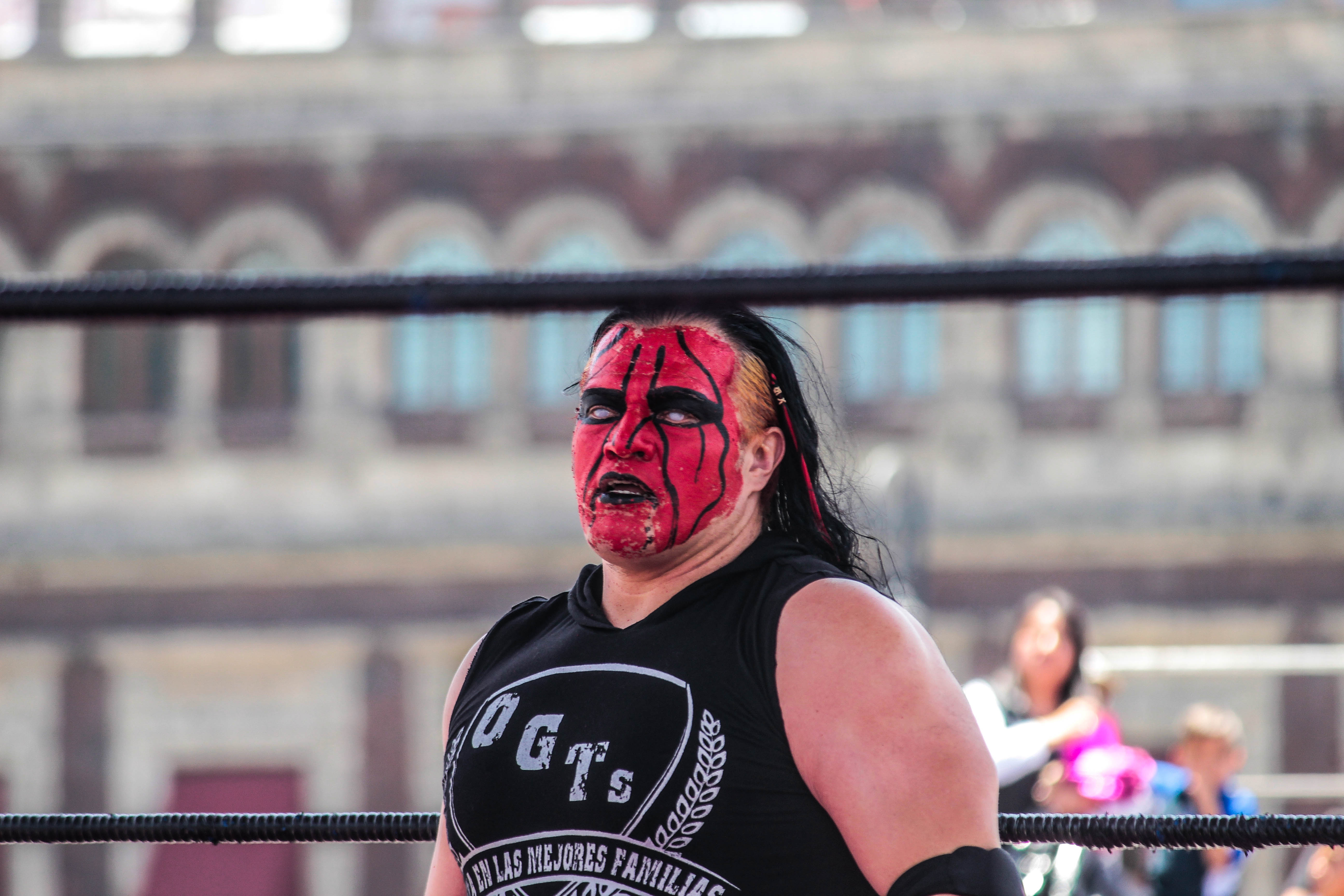 Le catcheur mexicain Chessman en 2018